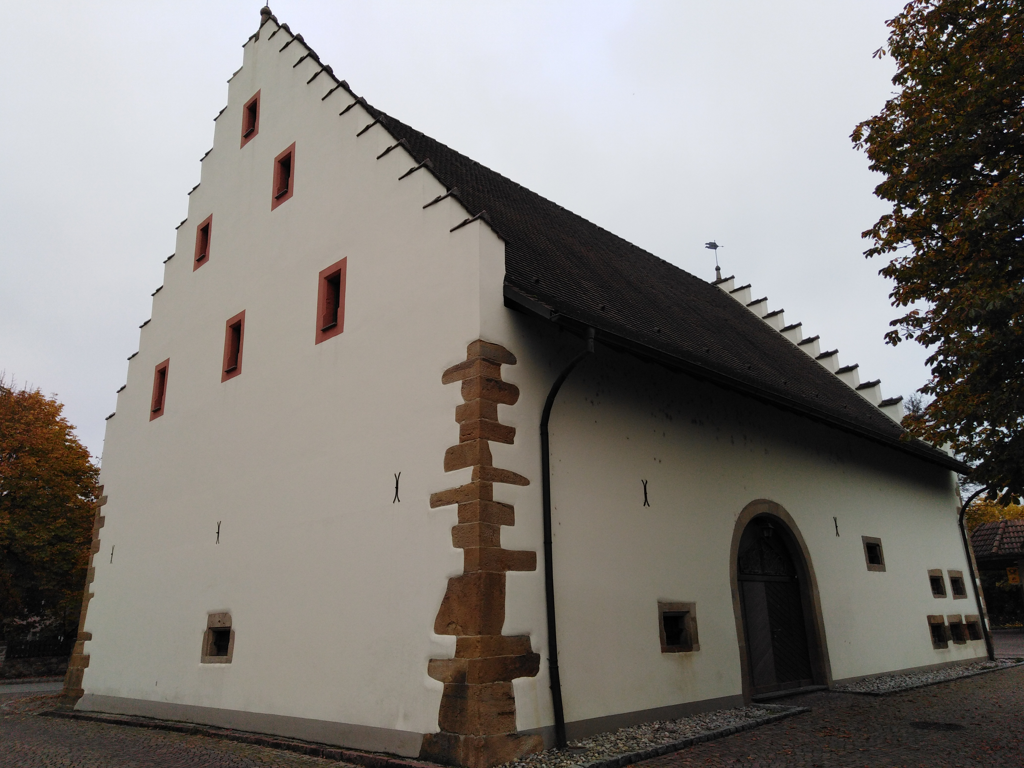 Ortschaft Rheinheim, Ortsteil der Gemeinde Küssaberg im Landkreis Waldshut in Baden-Württemberg. Historische Zehntscheuer des Klosters Rheinau.